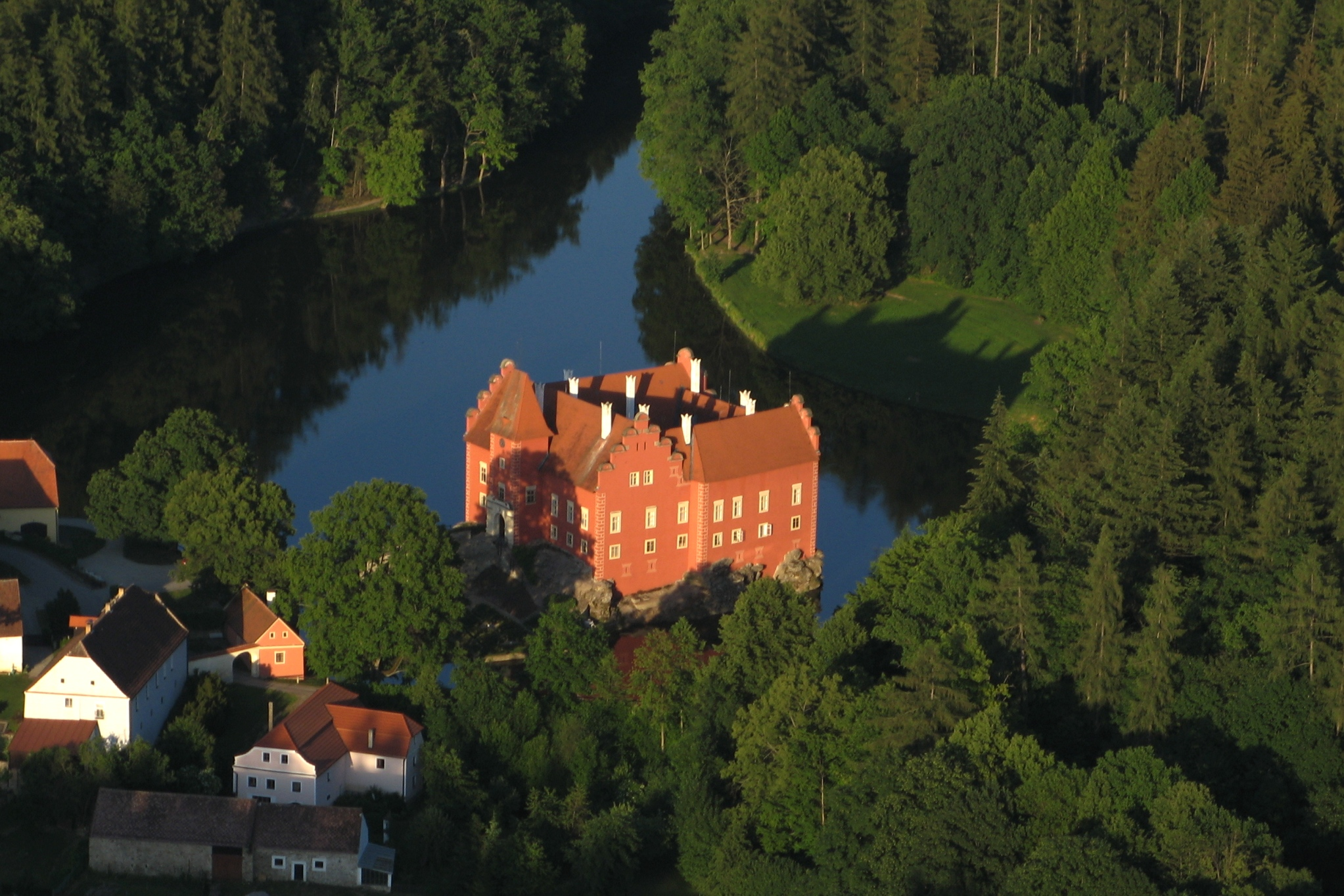 Zámek Červená Lhota, Červená Lhota 1